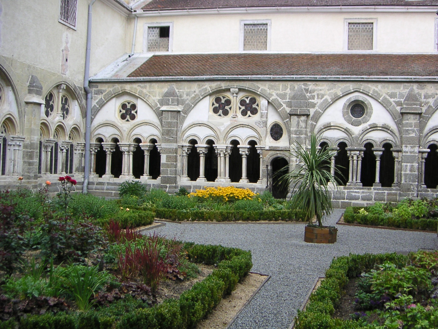 Hof innerhalb des Kreuzganges im Stift Zwettl, Niederösterreich, selbst fotografiert